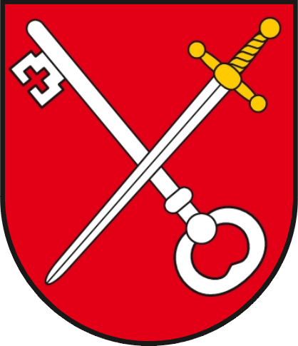 Herb gminy Tarnawatka